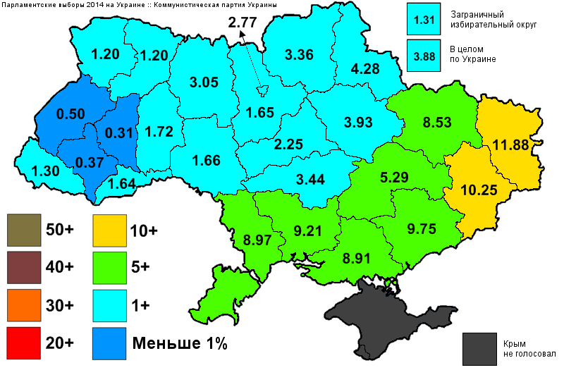 Результаты выборов в Верховную Раду Украины, которые состоялись 25 октября 2014 года. Информация с официального сайта ЦИК. Проценты по регионам для "Коммунистической партии Украины".